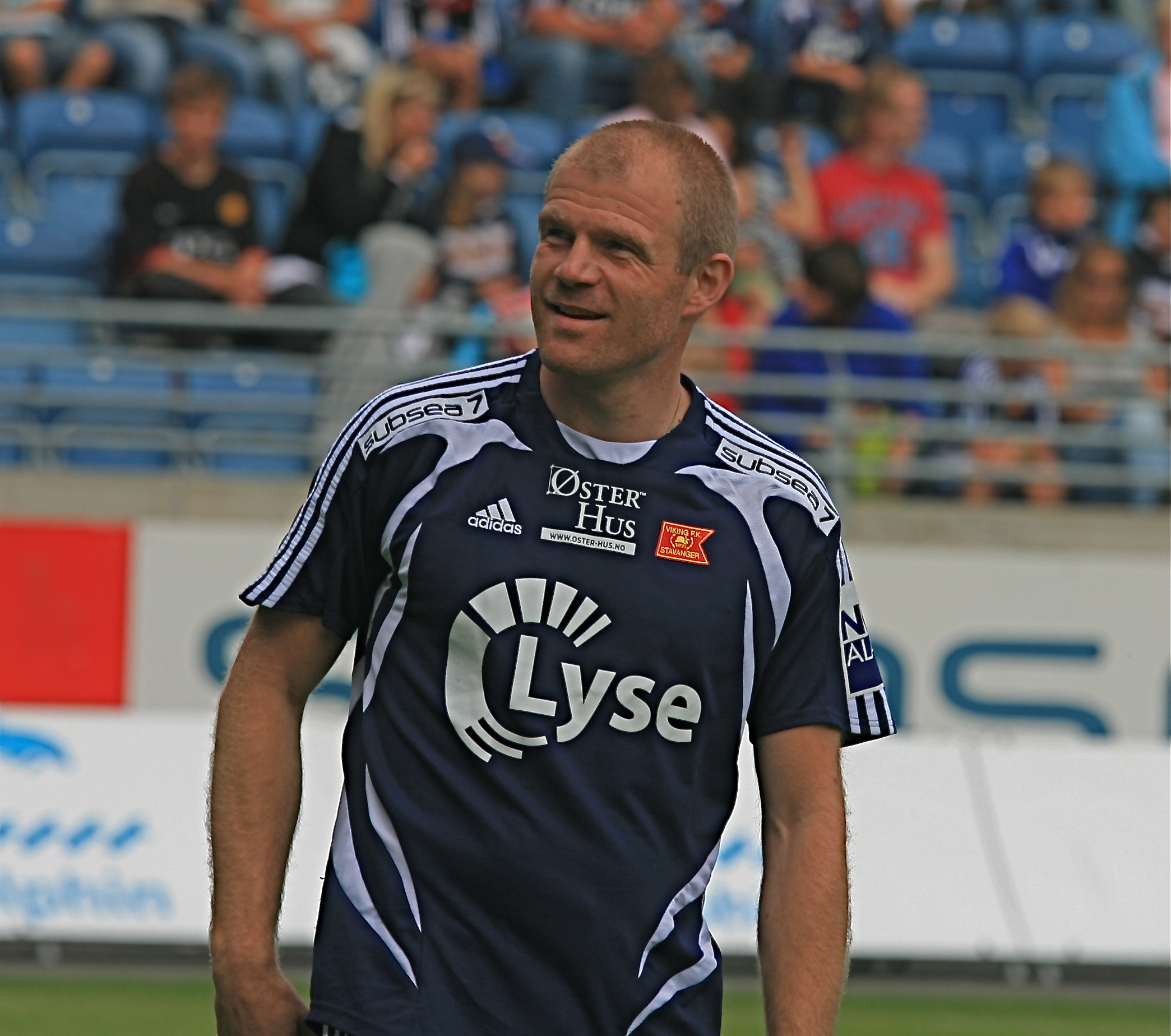 Egil Østenstad under kampen til Viking All Stars mot Liverpool Legends 10 juli 2008.